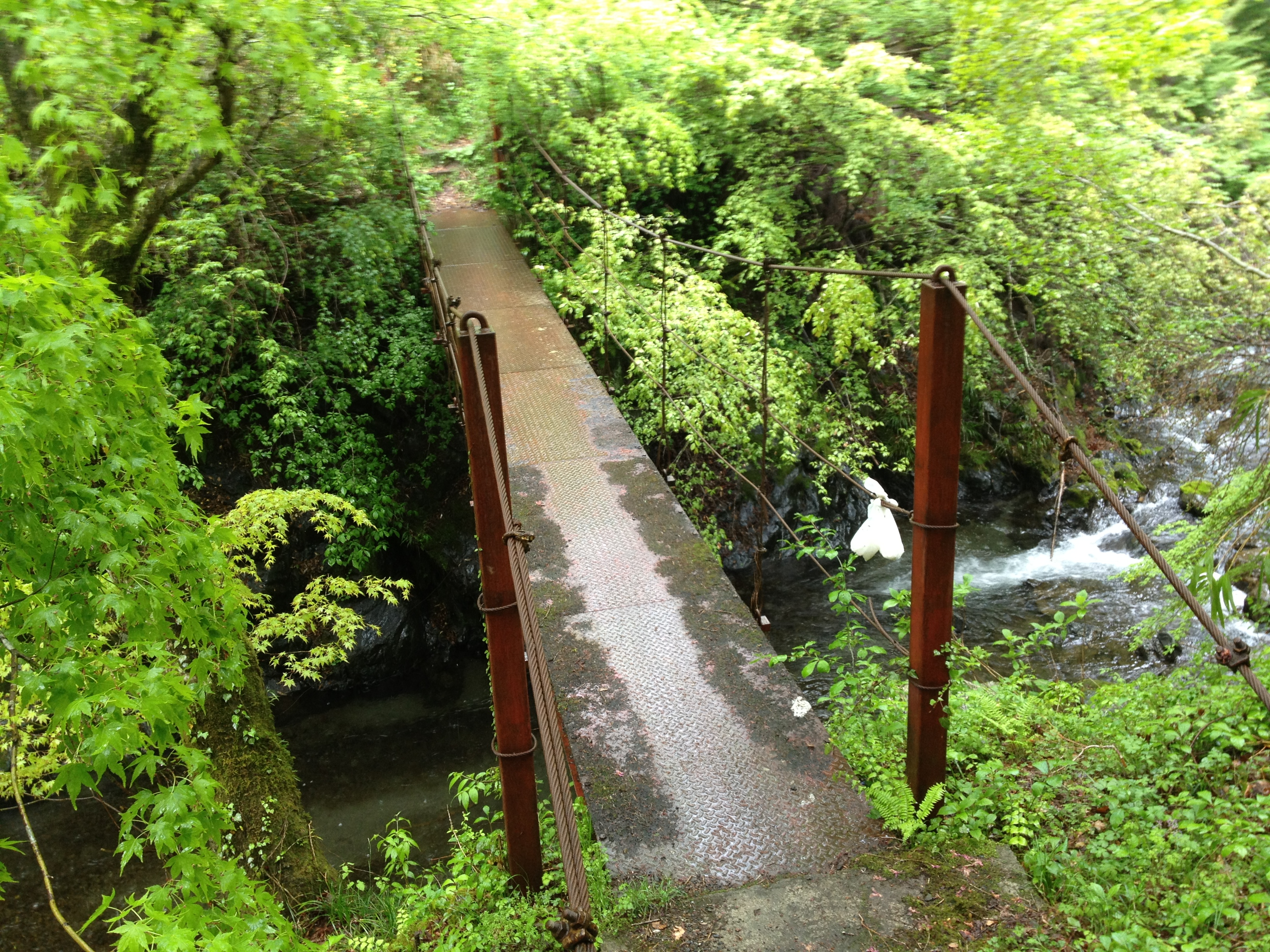 奥多摩町大丹波地区にかかる橋の１つ。大丹波川に架かっている比較的古い橋。